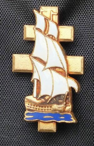 Insigne à broche, fabrication Augis, métal et émail, hauteur 3,5 cm. Frégate Croix de Loraine, classe River K 258 ( ex HMS Strule). Forces Navales Françaises Libres. Navigue de 1944 à 1961.